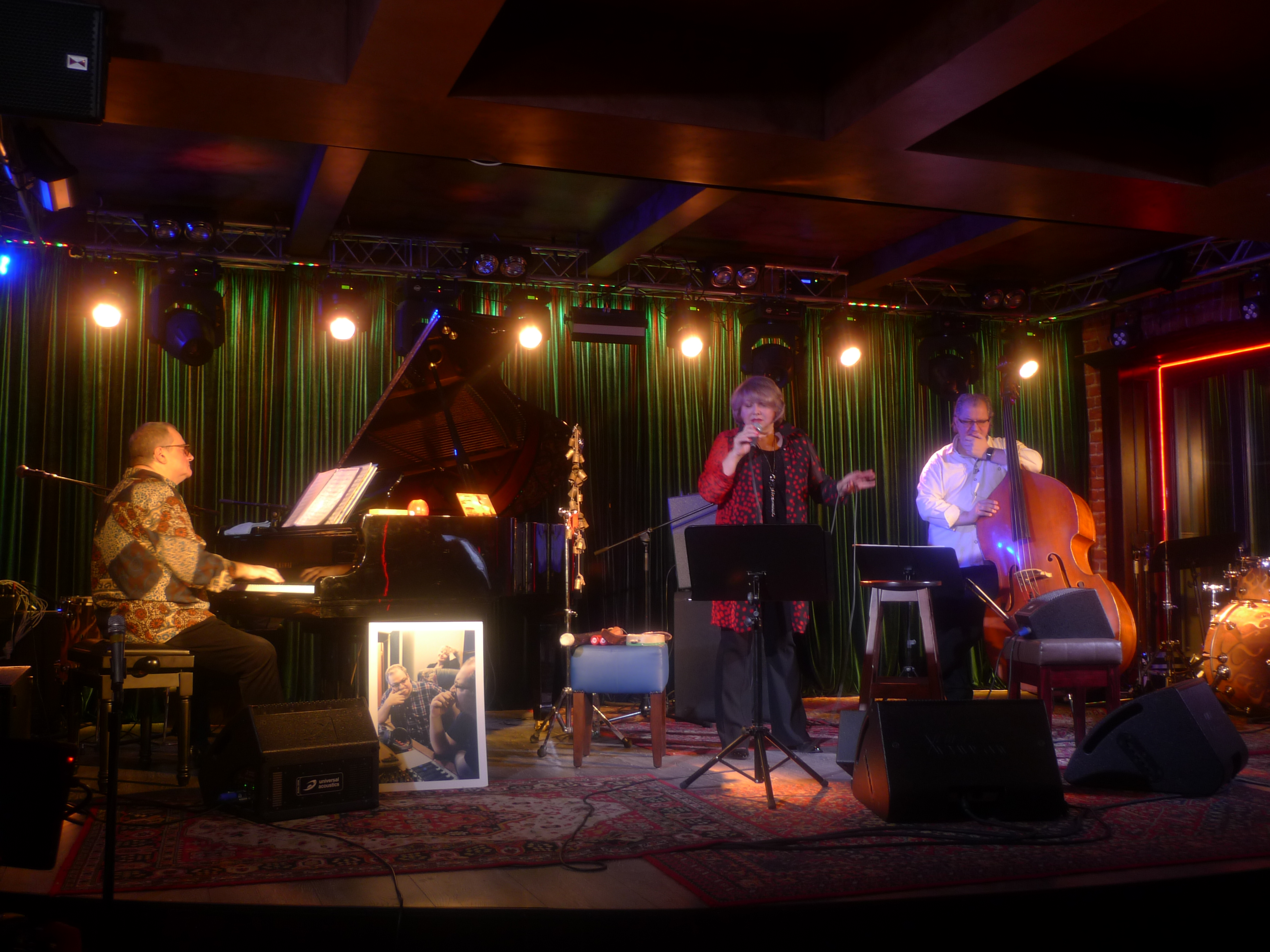 The Second Approach Trio in Kozlov Club 15-11-2017